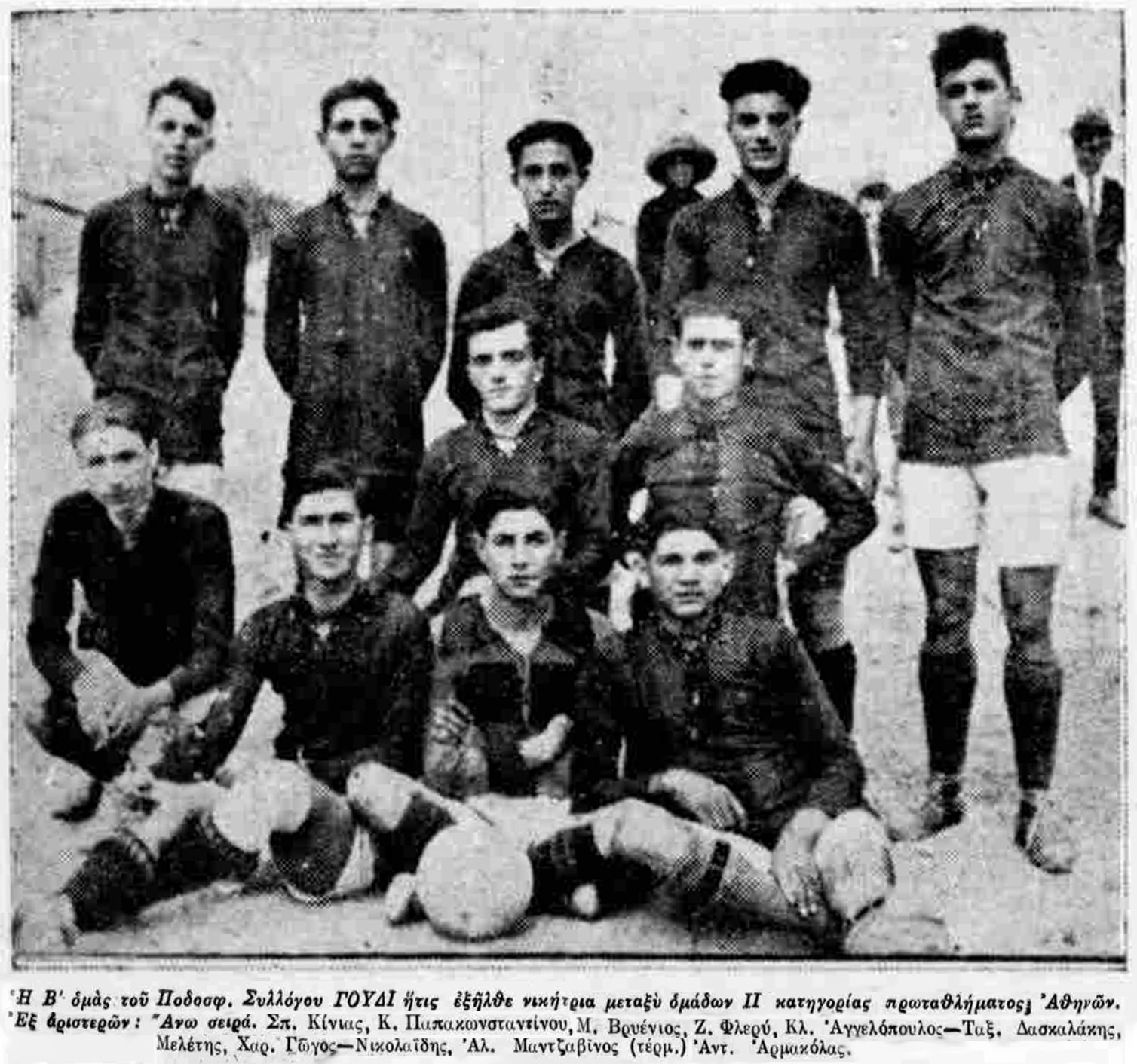 Η Β ομάδα του ΣΠ Γουδί το 1925